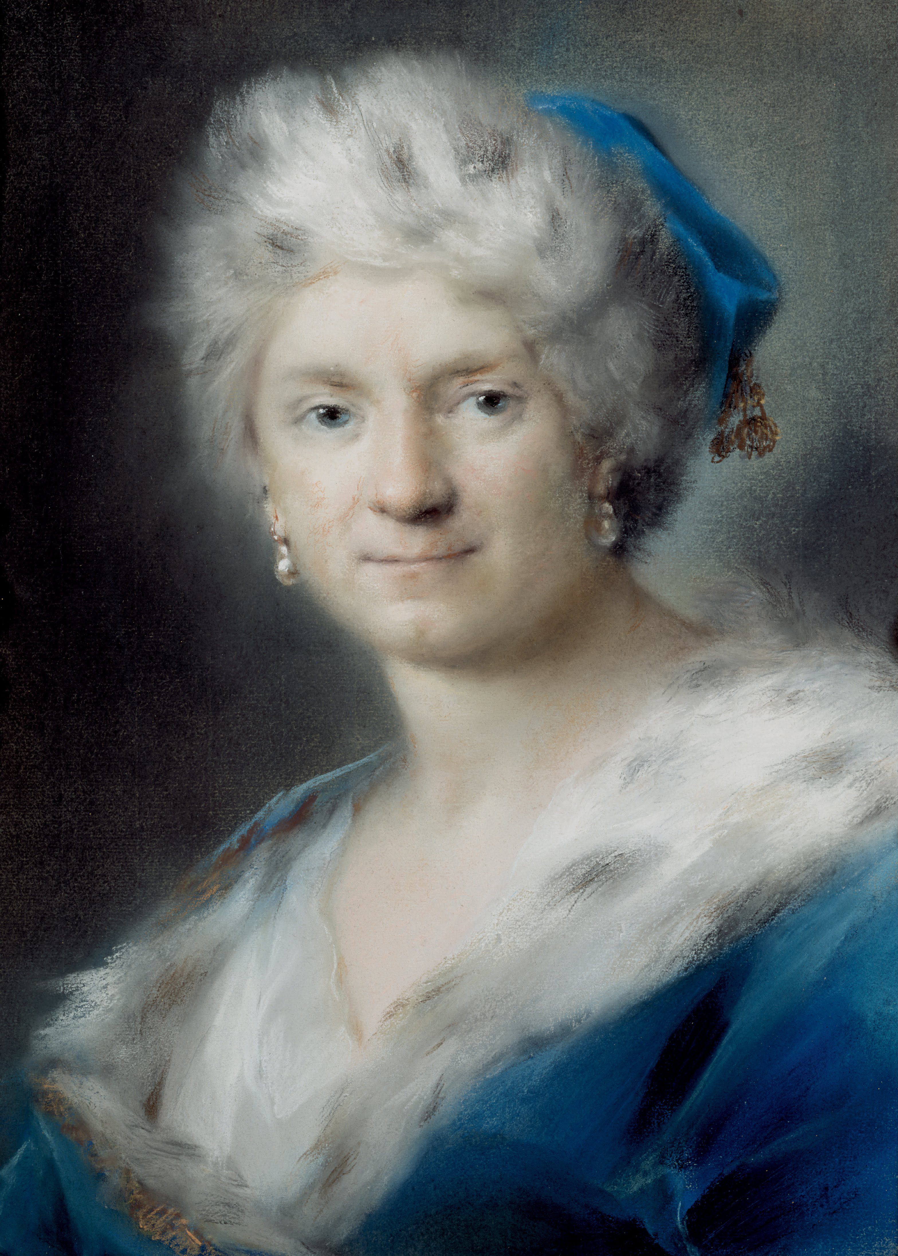 Self-Portrait as "Winter"label QS:Len,"Self-Portrait as "Winter""label QS:Lru,"Автопортрет в образе Зимы"